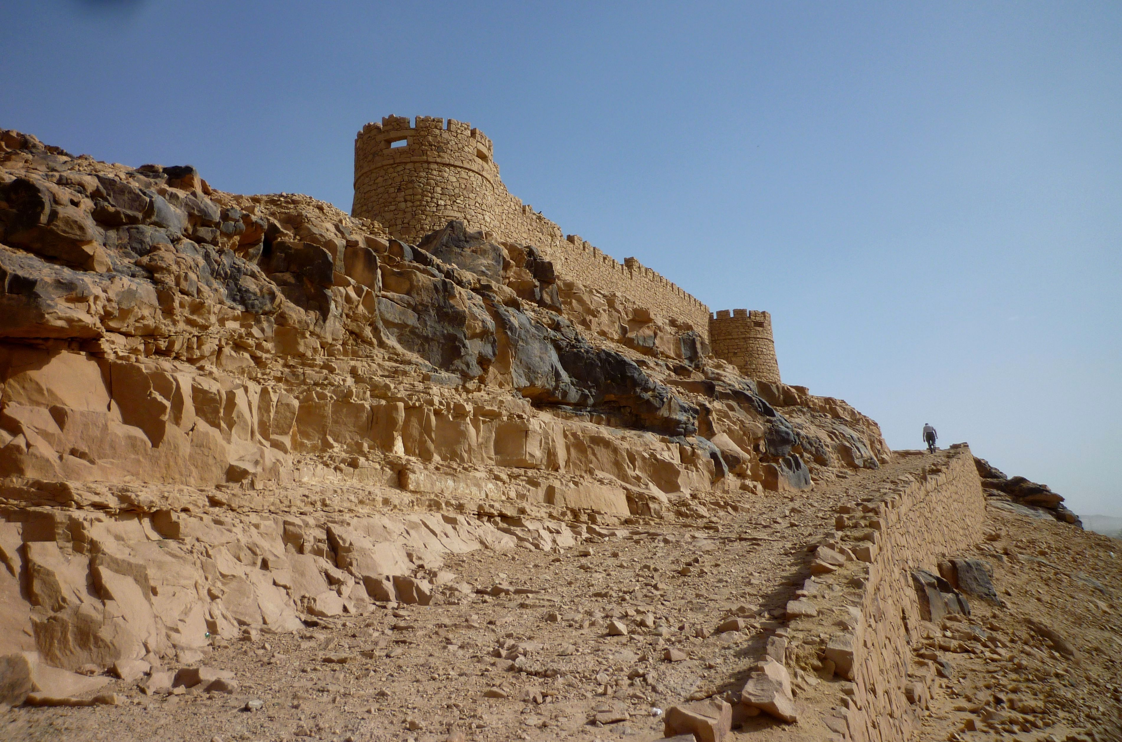 Ghat -Festung Koukemen,im frühen 20.Jahrh.von Italienern erbaut